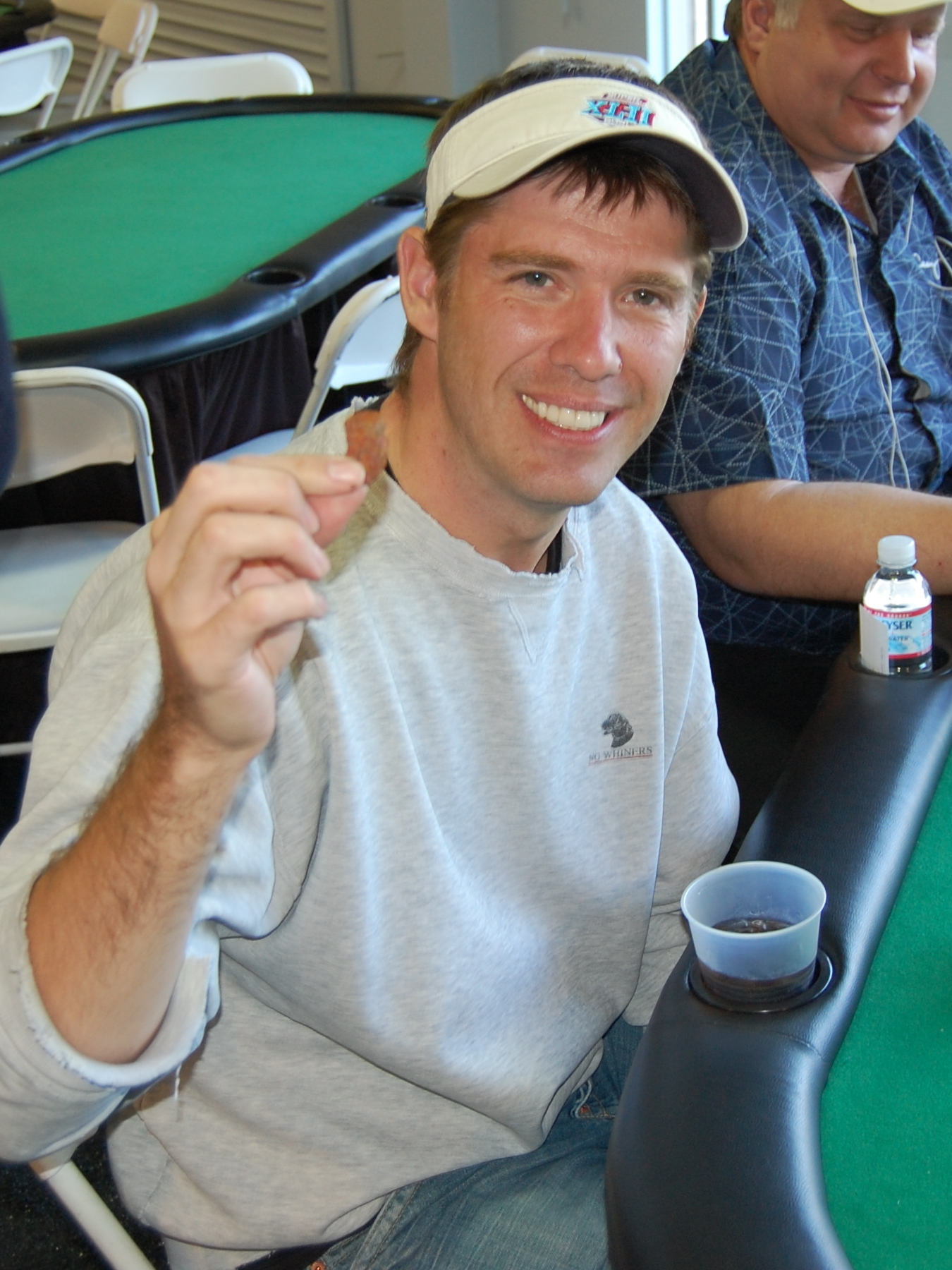 Layne Flack beim Bay 101 Shooting Star